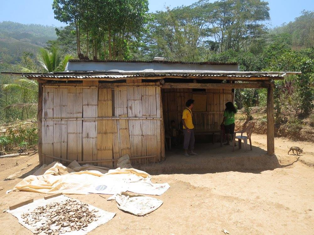 Tetun: Suku Tohumeta